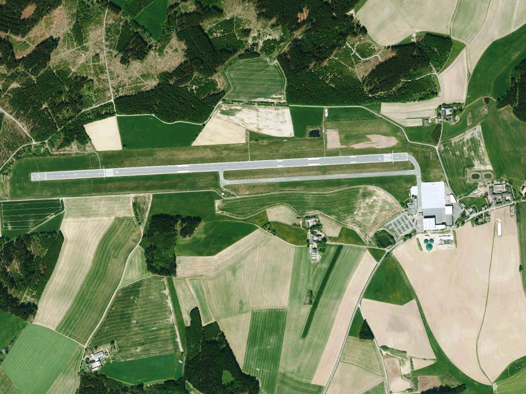 Luftaufnahme der Bayerischen Vermessungsverwaltung: Flugplatz in Hof an der Saale, Bayern.